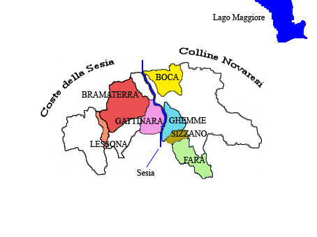 Weinanbauzonen des Nordpiemont